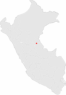 Ubicacion de la ciudad de Pucallpa en la Republica del Perú. Juan24' RONALDO YA FUISTES AHORA ES ARTURO JAJAJA